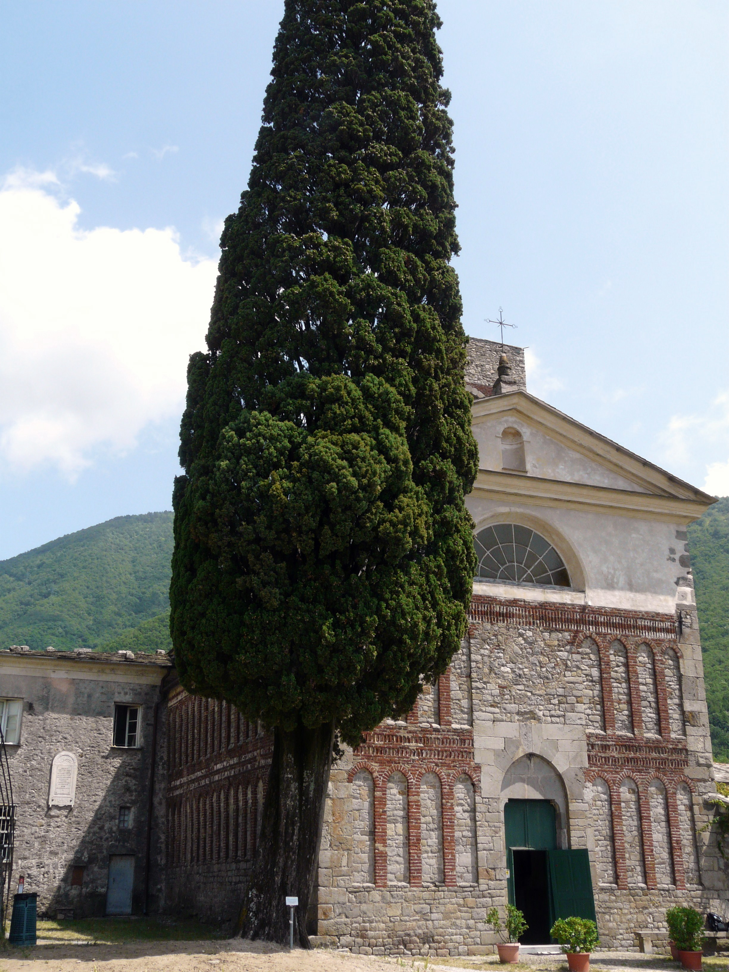 Il complesso dell'abbazia di Sant'Andrea di Borzone, Borzonasca, Liguria, Italia